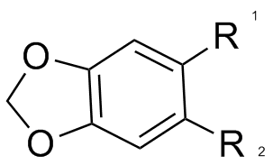 MDP (Methyleendioxyfenyl)